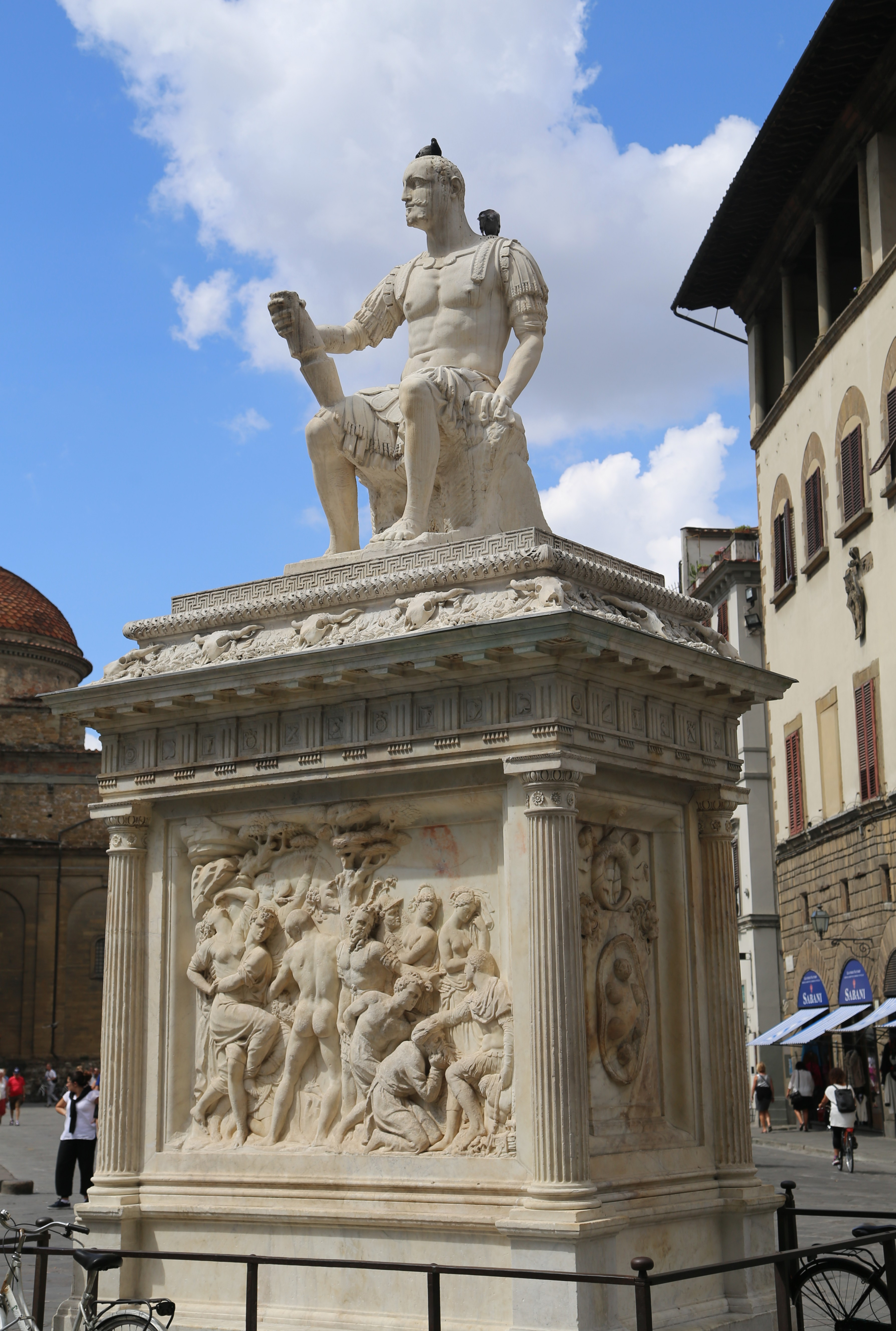 Monument Giovanni delle Bande Nere, Florenz